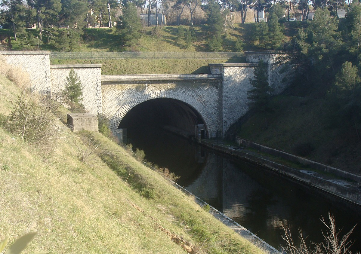 L'entrée nord du tunnel du Rove, sur la commune de Marignane (Bouches-du-Rhône)